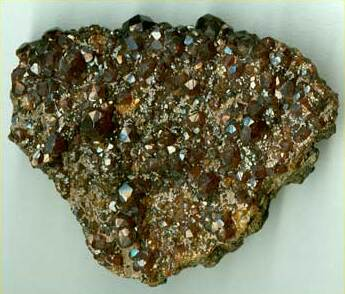 Друза кристаллов граната (андрадит), 7см. Синереченское м-ние, Приморье.